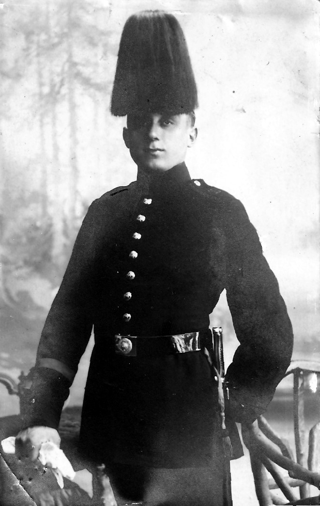 Goslarer Jäger